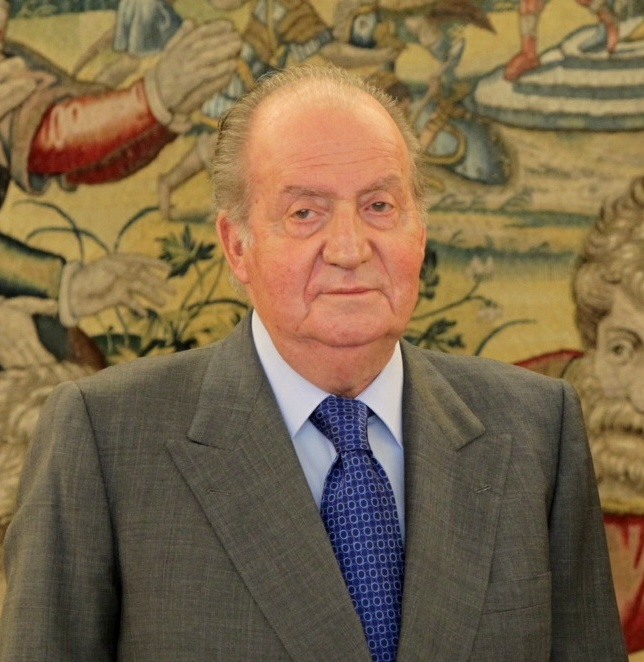 Juan Carlos I, rey de España